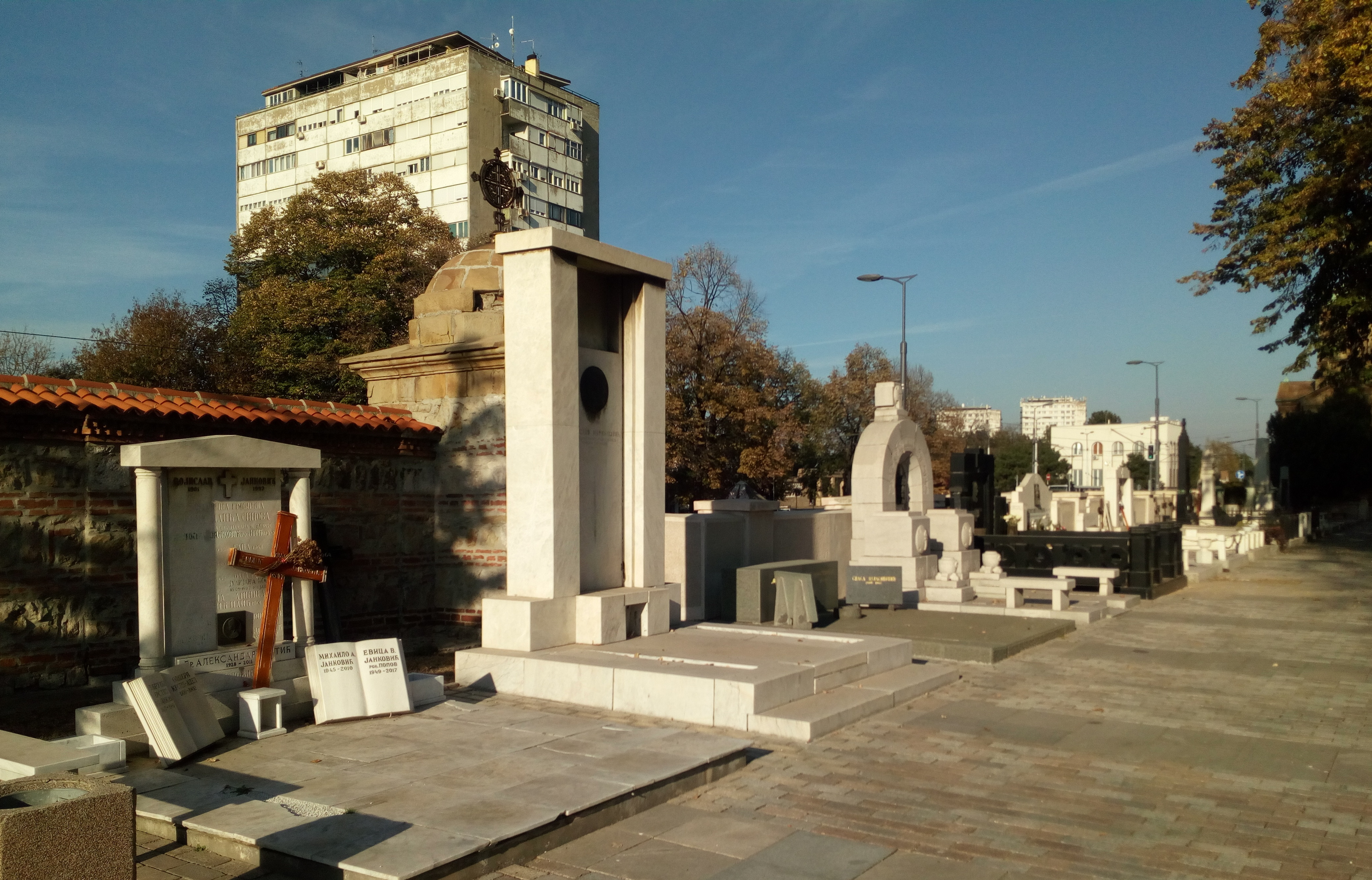 Аркаде на Новом гробљу у Београду